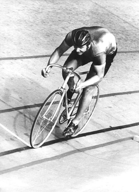 Emanuel Raasch ADN-ZB Gahlbeck 10-7-75-ba Leipzig:26. DDR-Meisterschaften im Bahnradsport - Bei den 26. DDR-Meisterschaften im Bahnradsport fiel am 10.7. auf der Leipziger Alfred-Rosch-Kampfbahn die Entscheidung im 1000-m-Zeitfahren. Neuer DDR-Meister wurde in einer Zeit von 1:06,70 Emanuel Raasch vom SC Dynamo Berlin.